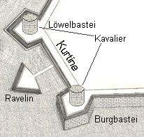 Festungsüberblick der Stadtmauern Wiens von 1548 bis 1872